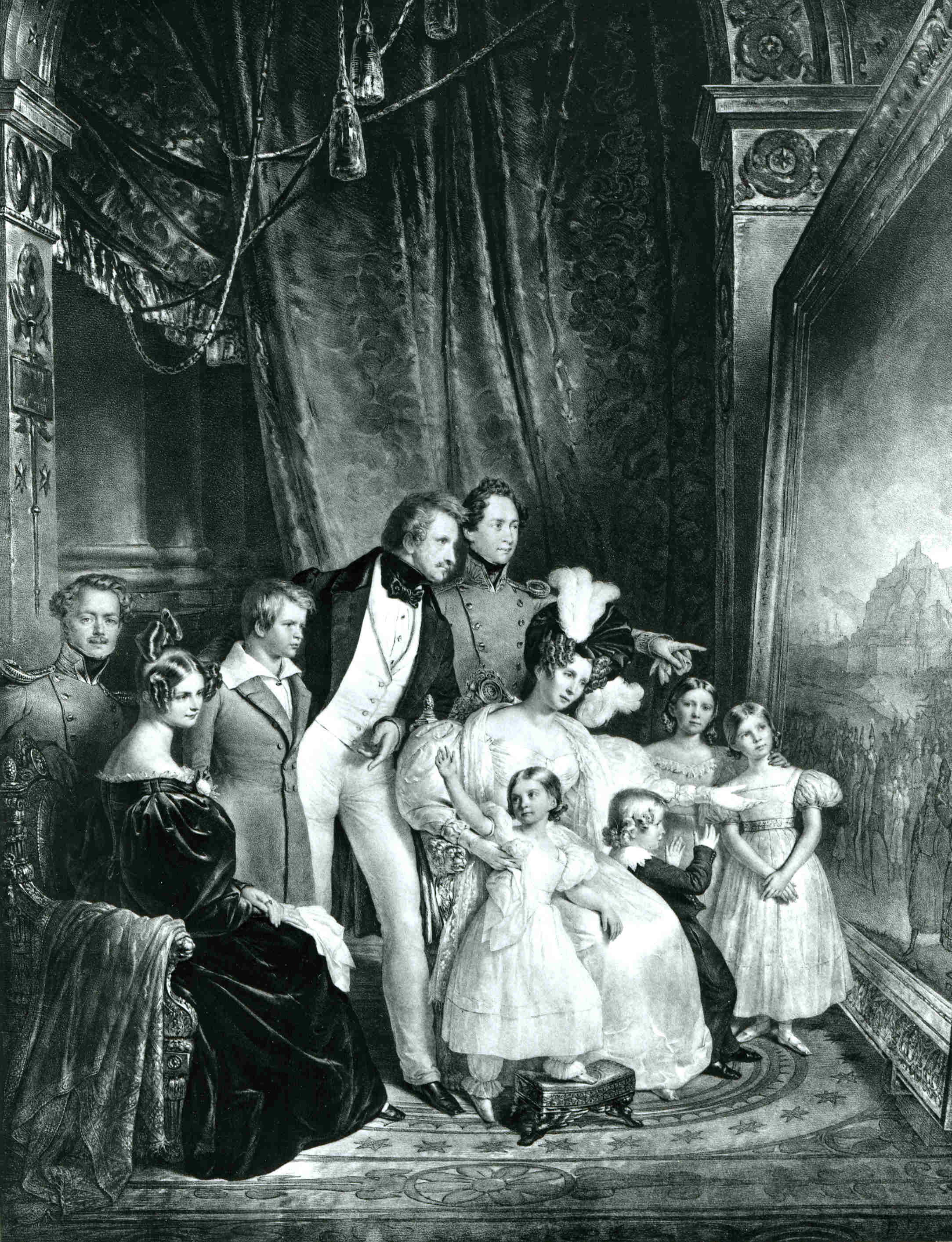 Der König und seine Familie betrachten das Gemälde „Ankunft des Königs Otto in Nauplia" von Peter von Heß. Neben dem König stehen Kronprinz Maximilian in Uniform sowie der spätere Prinzregent Luitpold. Vor dem König sitzend Königin Therese, umgeben von den vier jüngsten Kindern: am Arm der Königin Prinzessin Alexandra sowie Prinz Adalbert. Er wird später vorübergehend als Nachfolger Ottos in Griechenland gehandelt. Rechts davon, unmittelbar vor dem Gemälde, stehen die Prinzessinnen Adelgunde und Hildegard. Links außen sitzend Prinzessin Mathilde Karoline, ganz außen Prinz Carl, der jüngere Bruder König Ludwigs und Generalfeldmarschall der bayerischen Armee. Carl war die Kandidatur für den griechischen Thron noch vor Otto angetragen worden, er hatte jedoch abgelehnt. Auf dem betrachteten Gemälde sind Otto von Griechenland und die Mitglieder seiner Regentschaft vor der Silhouette von Nauplia mit der Festung Palamides zu sehen.